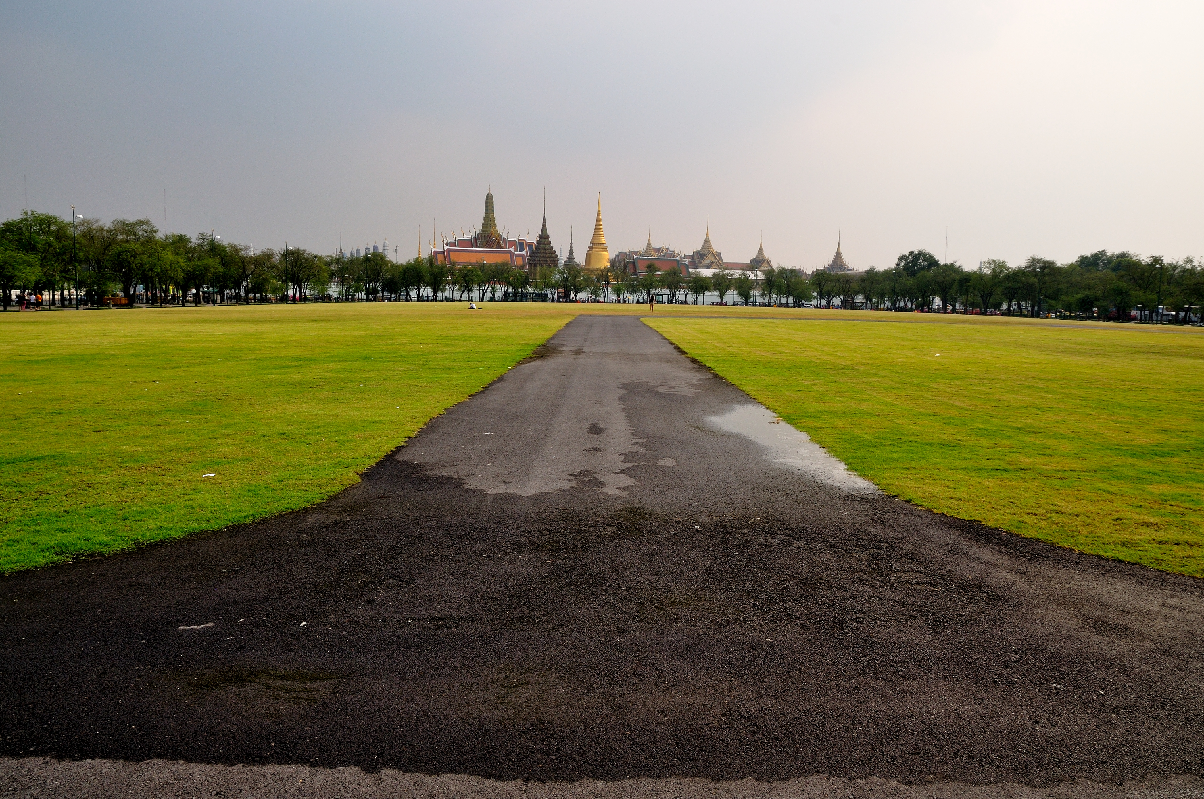 วัดพระศรีรัตนศาสดาราม หรือที่เรียกกันทั่วไปว่า วัดพระแก้ว เป็นวัดที่ พระบาทสมเด็จพระพุทธยอดฟ้าจุฬาโลกมหาราชโปรดเกล้าฯ ให้สร้างขึ้นใน พ.ศ. 2325 เป็นวัดในพระบรมมหาราชวัง เช่นเดียวกับ วัดพระศรีสรรเพชญ์ ซึ่งเป็นวัดในพระราชวังหลวงในสมัยอยุธยา และมีพระราชประสงค์ให้วัดพระศรีรัตนศาสดารามเป็นที่ประดิษฐาน พระพุทธมหามณีรัตนปฏิมากร หรือพระแก้วมรกต ที่นำมาจากกรุงเวียงจันทร์ แต่แท้ที่จริงแล้ว พบเจอวัดพระแก้ว จังหวัดเชียงราย และเป็นสถานที่ทรงบำเพ็ญพระราชกุศล วัดพระศรีรัตนศาสดารามเป็นวัดที่ไม่มีพระสงฆ์จำพรรษาอยู่ เพราะมีแต่ส่วนพุทธาวาสไม่มีส่วนสังฆาวาส